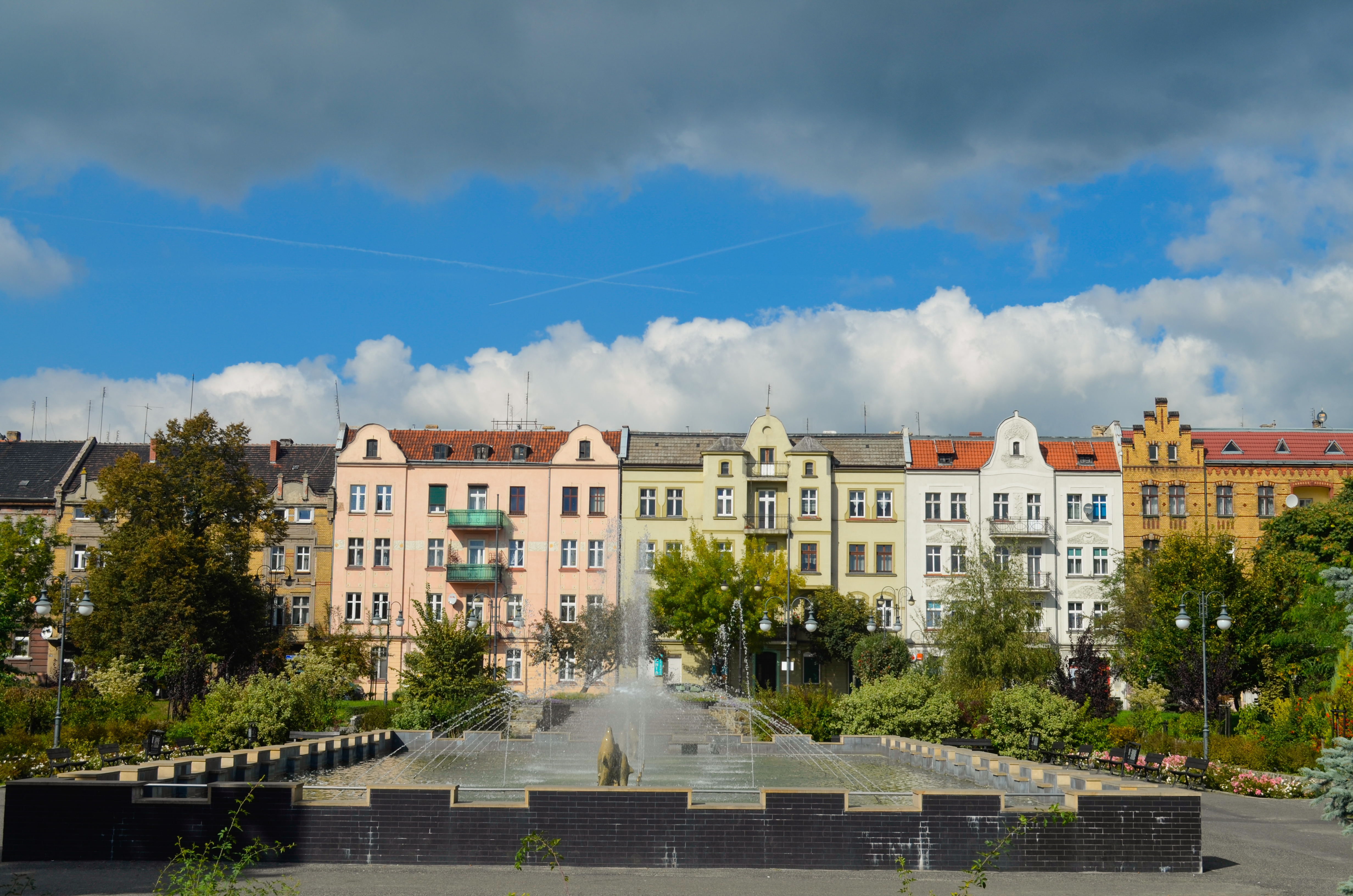 Nowa Sól, dom